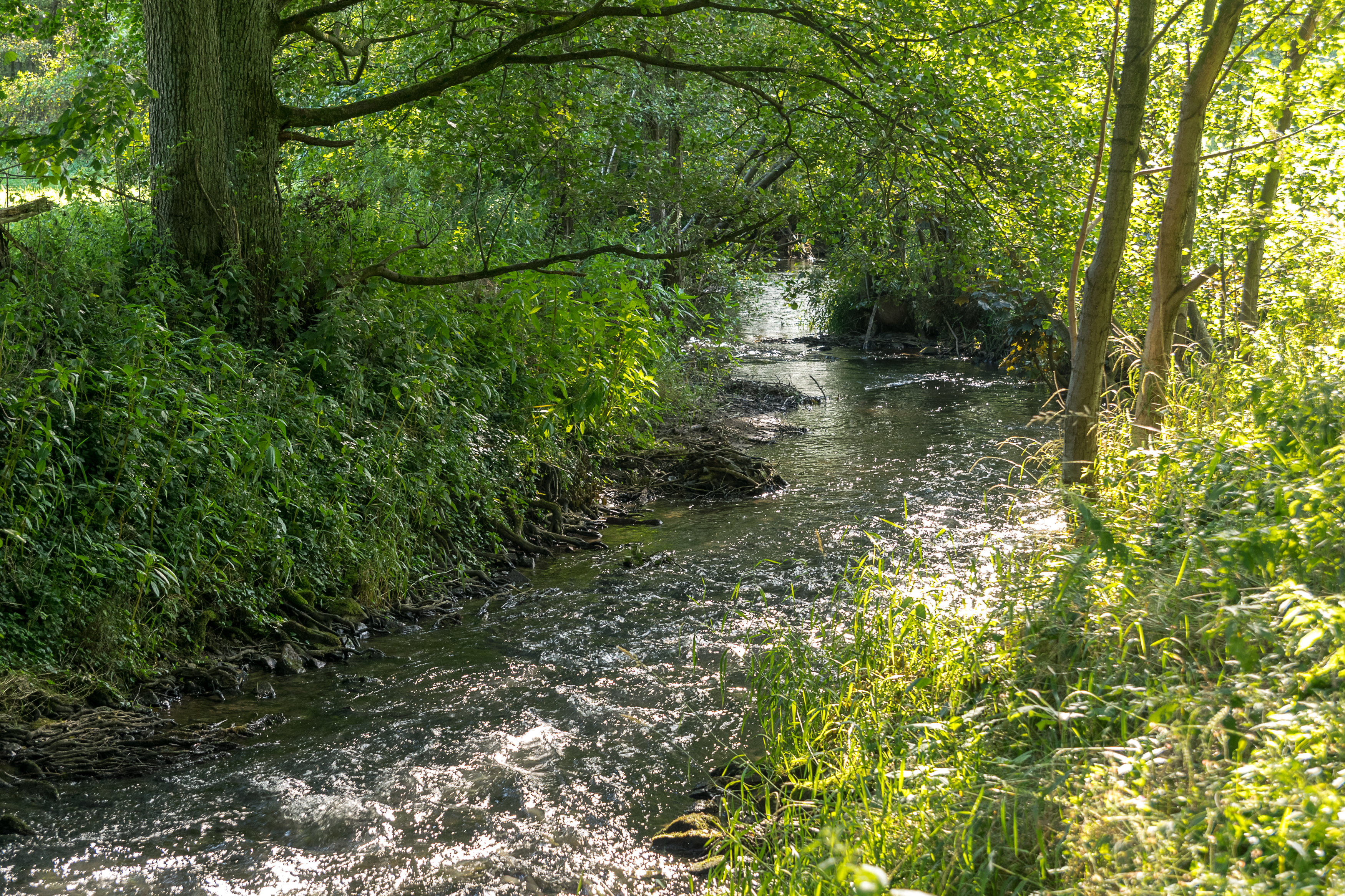 Naturschutzgebiet "Begatal" in Dörentrup, Kreis Lippe